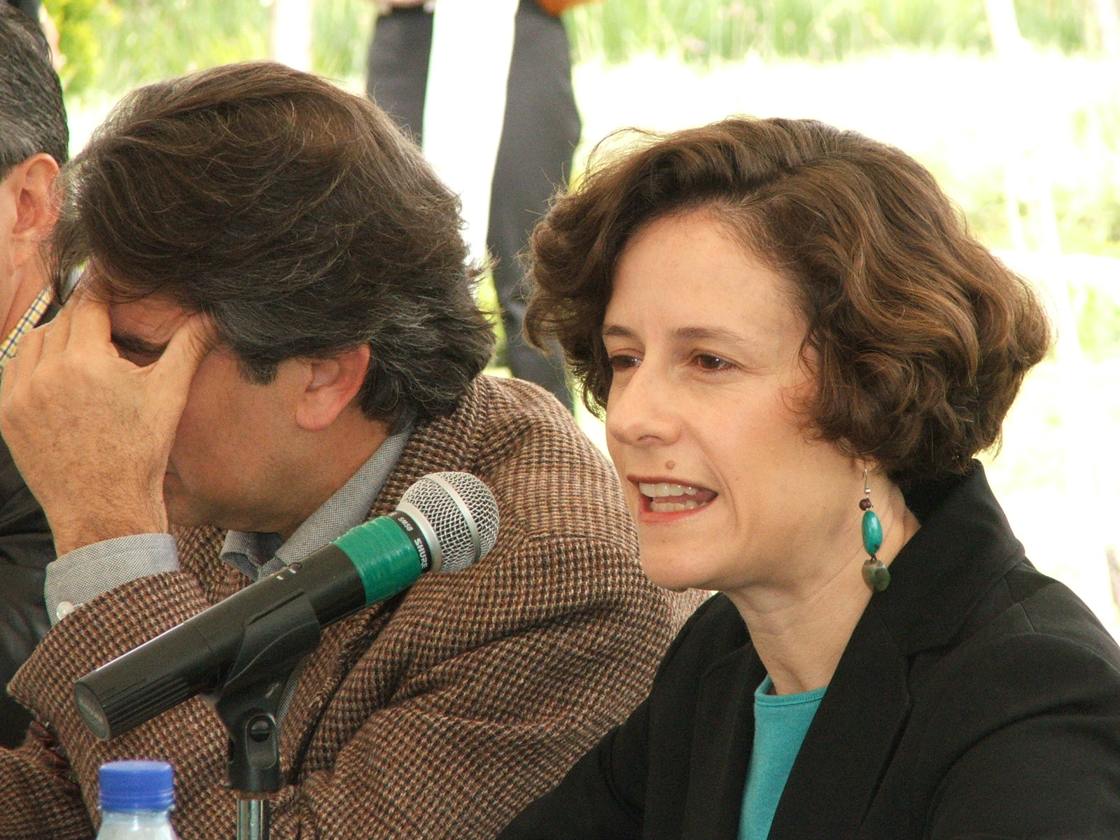 Denise Dresser durante el encuentro Estío - UDLA 2005.